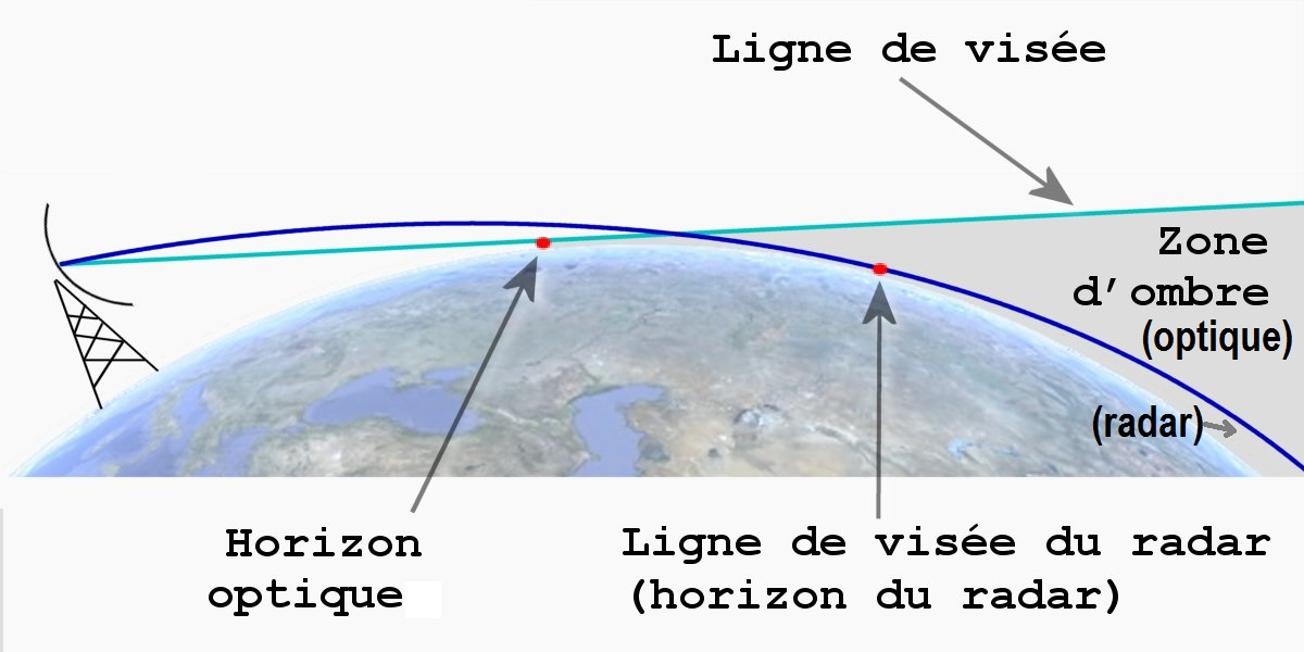 Unterschied zwischen optischem Horizont und dem Radar- oder Radiohorizont